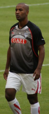 Cacau beim Aufwärmen vor dem Spiel des VfB Stuttgart gegen den BVB.